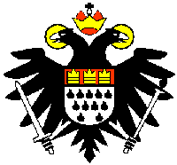 von ; selbst gemalt, Public Domain 13:35, 15. Sep 2002 Magnus Manske 200 x 186 (2.255 Byte) (von )